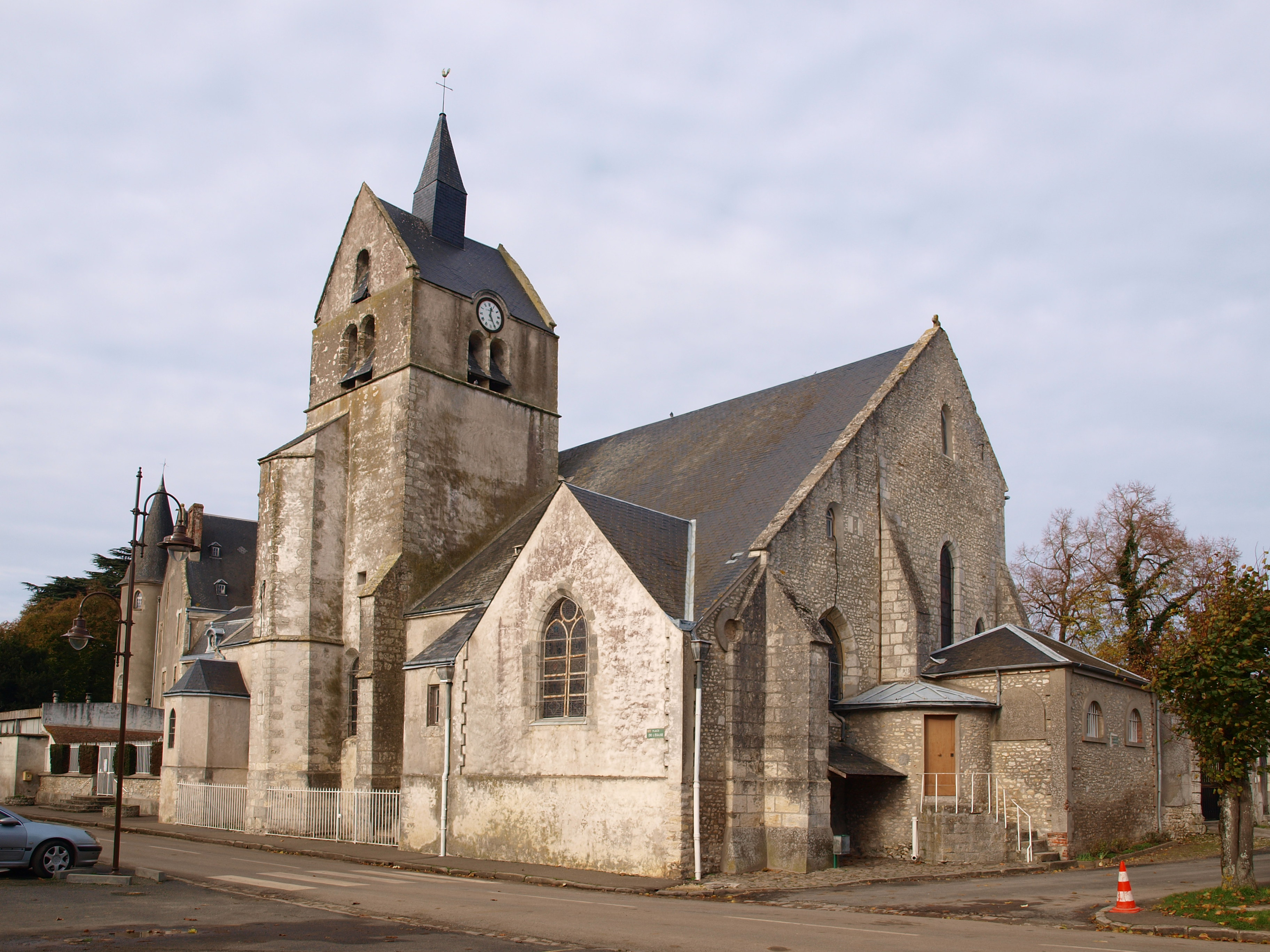 Oysonville (Eure-et-Loir, France) ; l'église